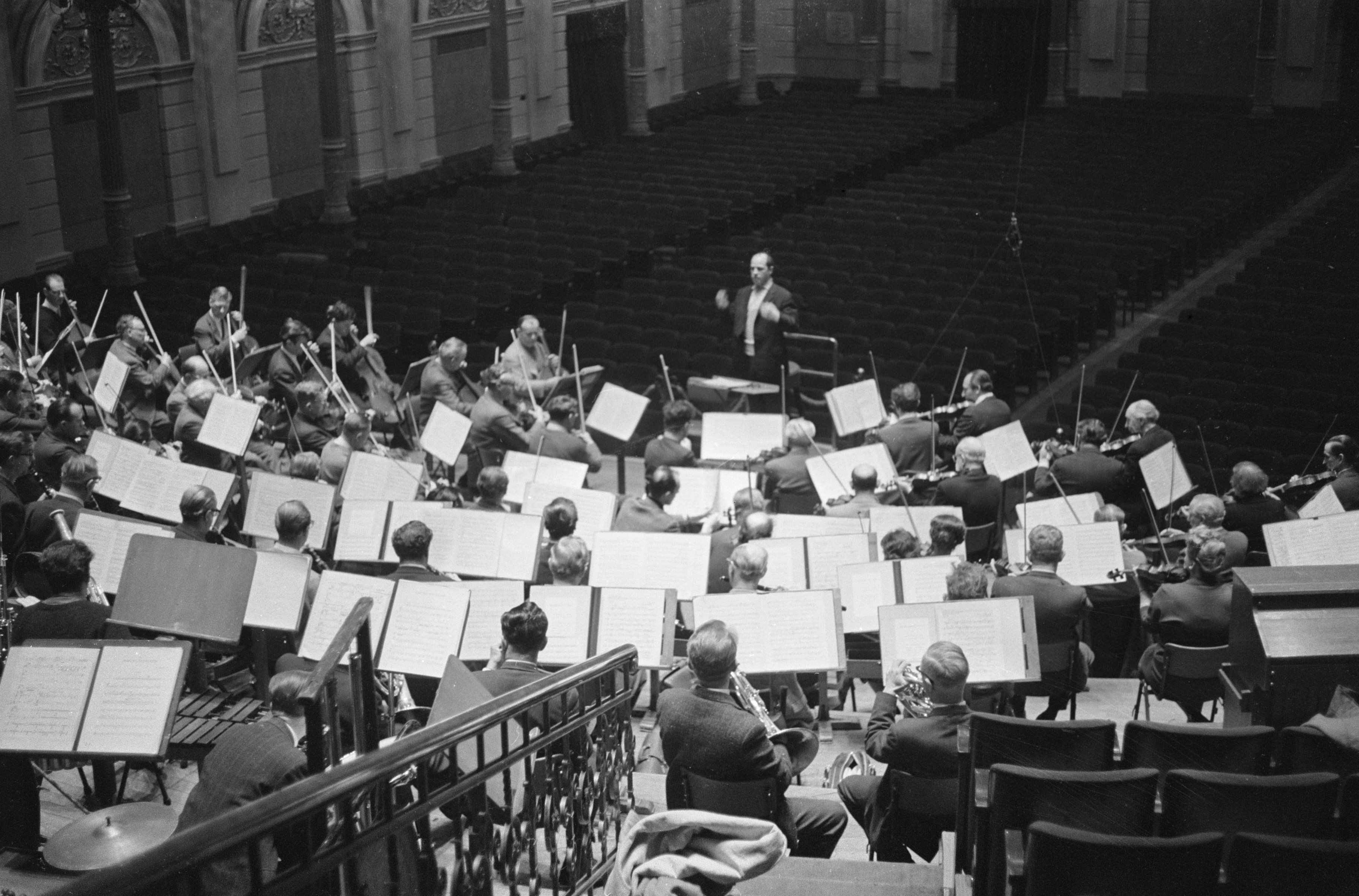 Collectie / Archief : Fotocollectie Anefo Reportage / Serie : [ onbekend ] Beschrijving : Pierre Boulez gastdirigent bij het Concertgebouworkest Datum : 6 februari 1963 Locatie : Amsterdam Trefwoorden : dirigenten, orkesten Persoonsnaam : Boulez, Pierre Fotograaf : Pot, Harry / Anefo Auteursrechthebbende : Nationaal Archief Materiaalsoort : Negatief (zwart/wit) Nummer archiefinventaris : bekijk toegang 2.24.01.05 Bestanddeelnummer : 914-7938